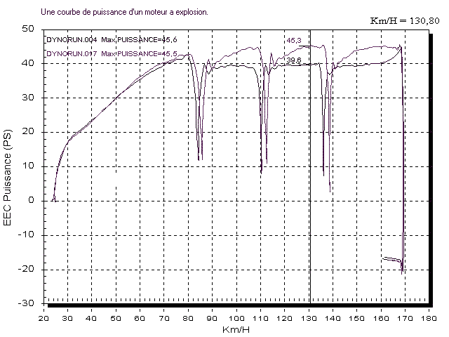 Une courbe de puissance moteur totalement libre de droits.